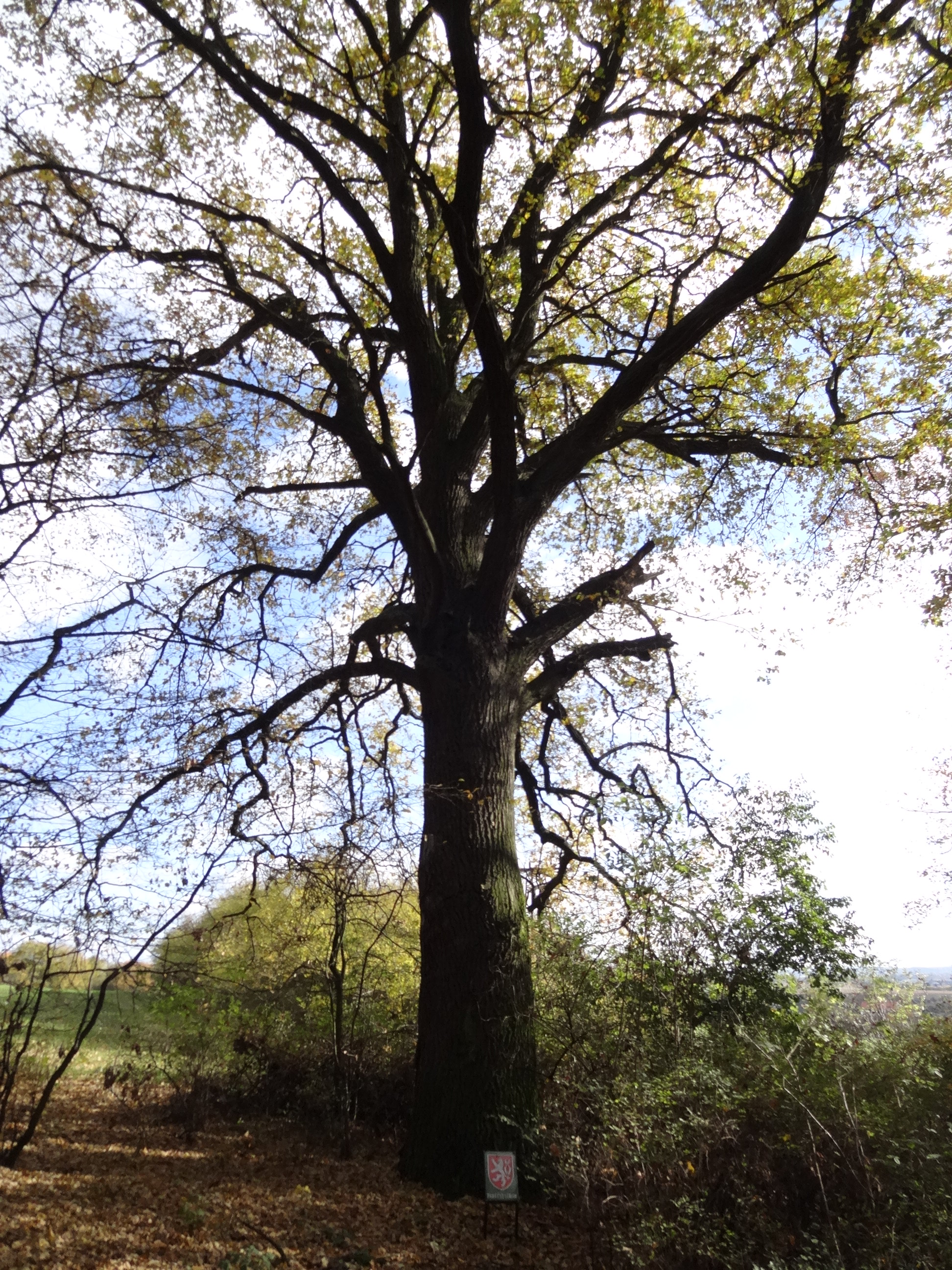 Točná - památný dub letní na okraji lesa severně od Branišovské ulice